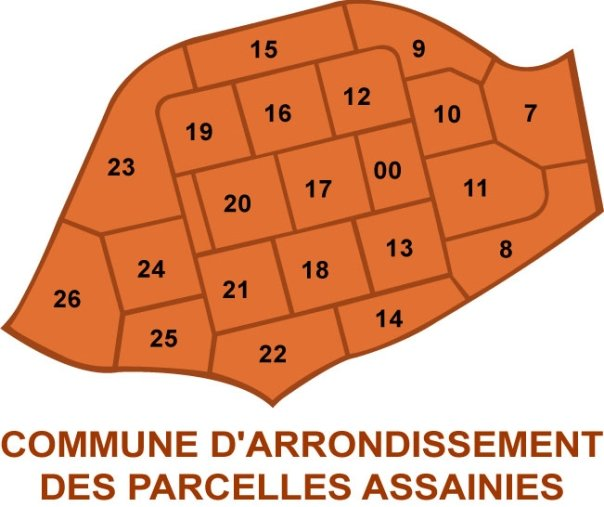 Plan des Parcelles Assainies